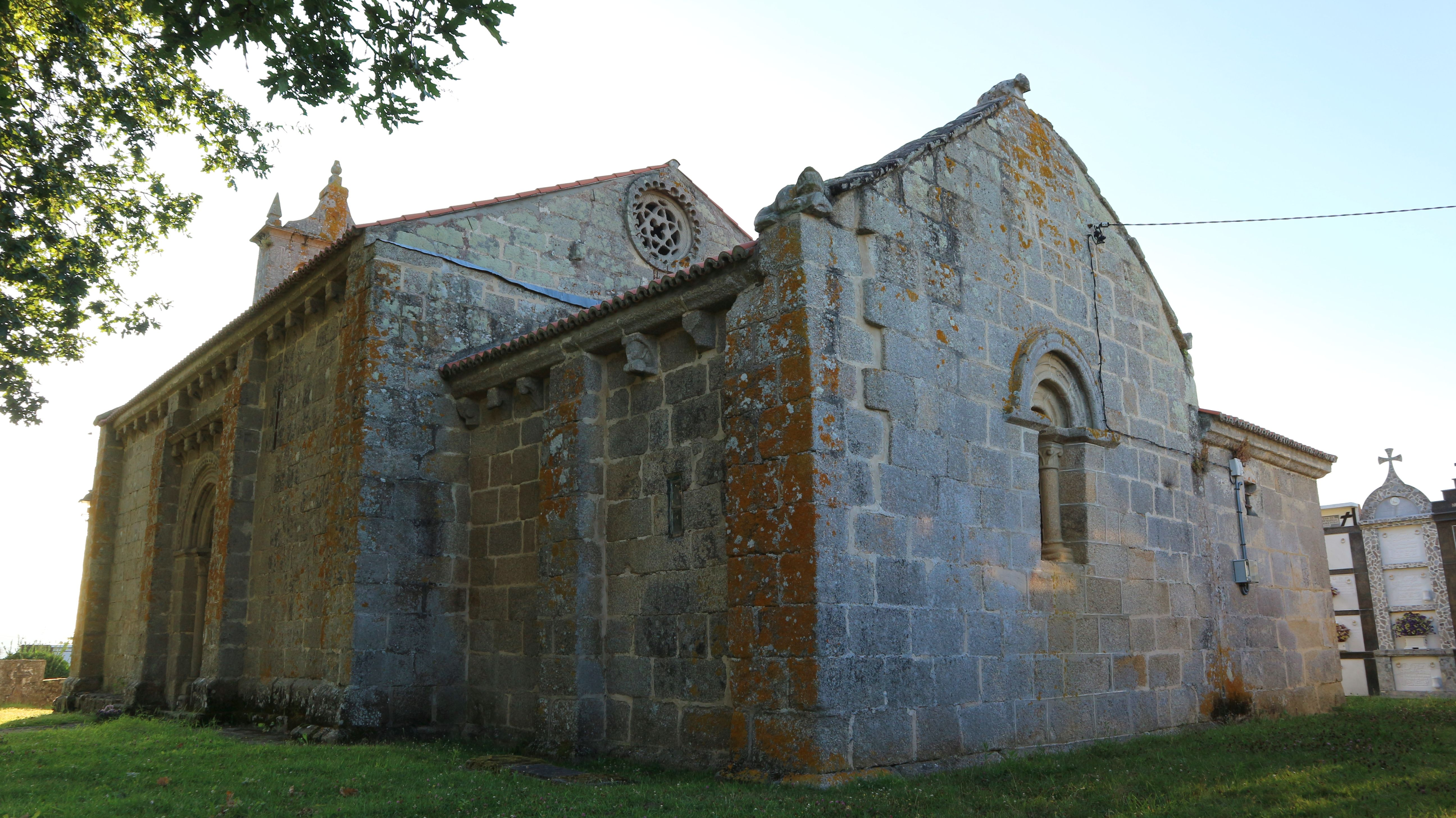 Igrexa de San Martiño de Tiobre. Betanzos O Vello, Tiobre, Betanzos.